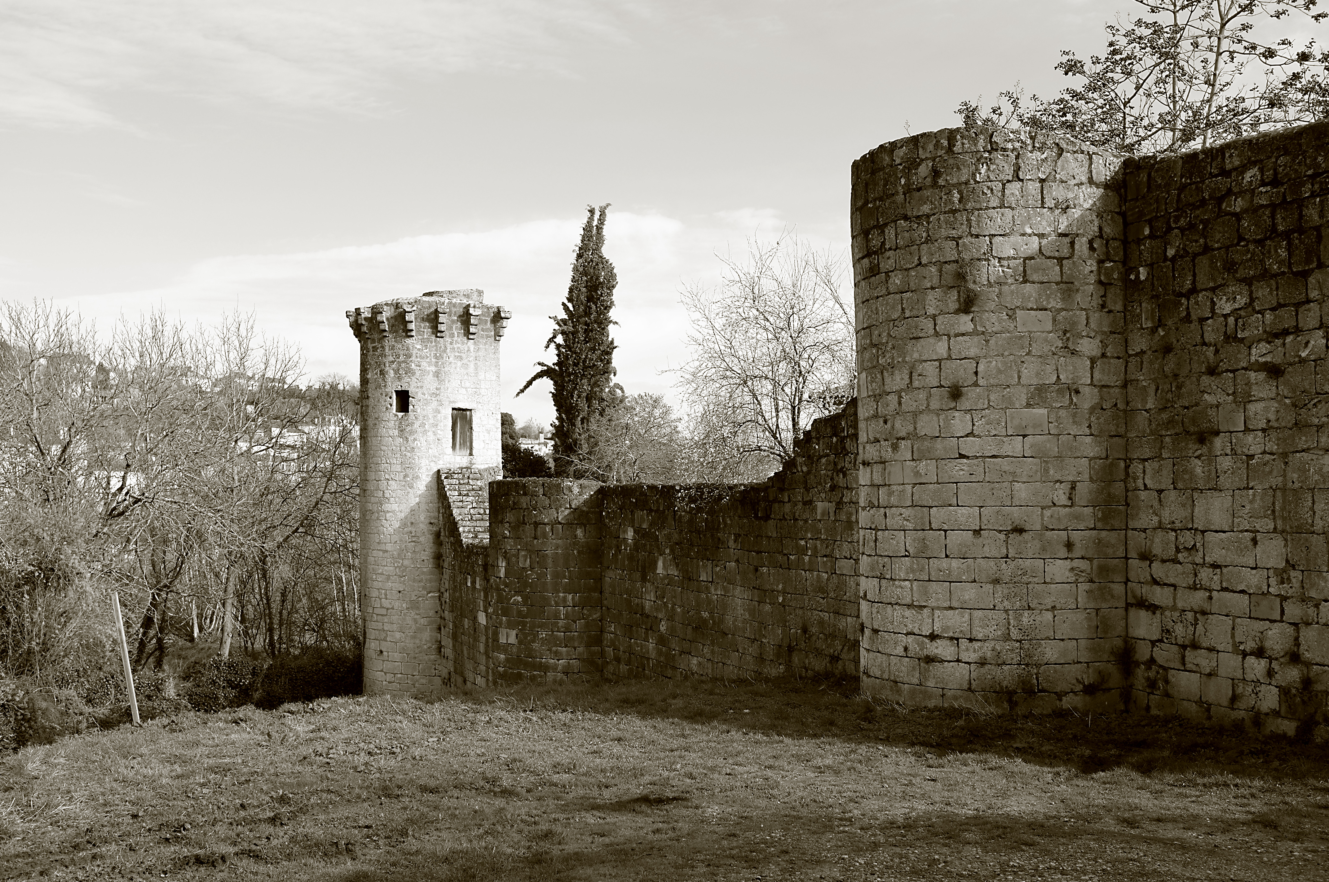 Poitiers (Vienne, France) - Rue des Remparts.